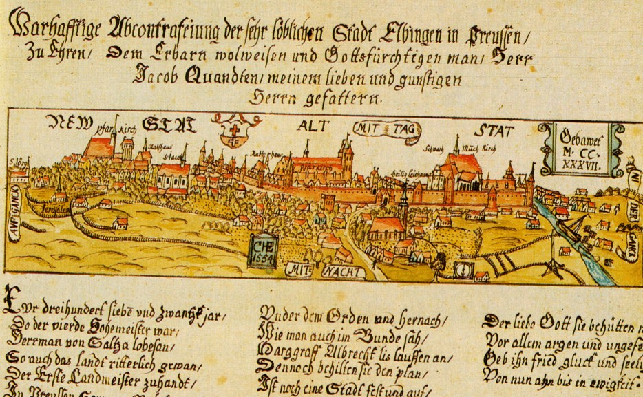 Najstarsza panorama Elbląga z 1554 roku